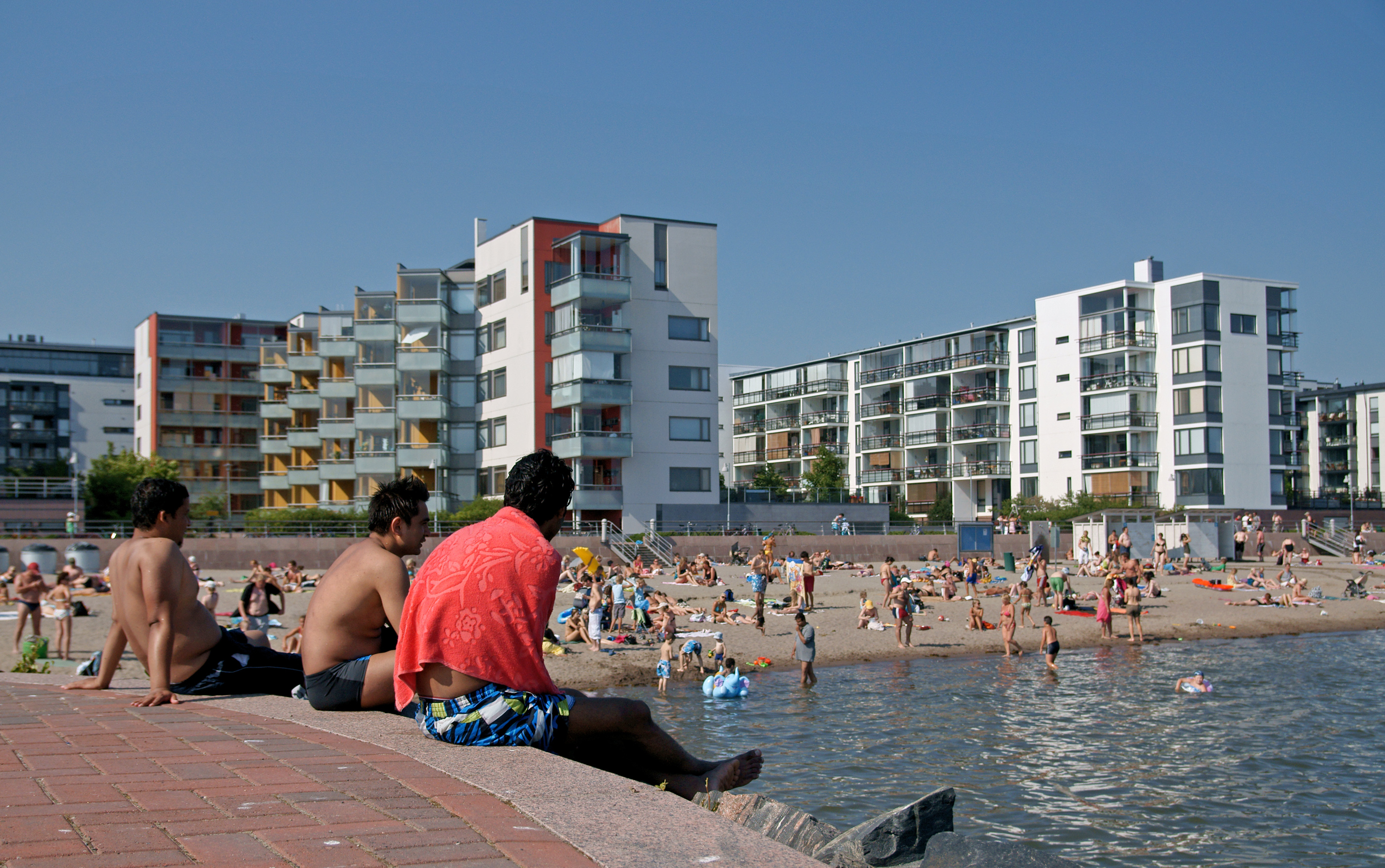 Maahanmuuttajia Aurinkolahden uimarannan edustalla.